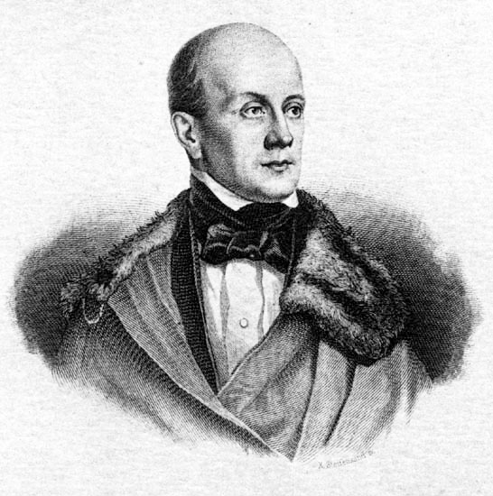 Чаадаев Петр Яковлевич